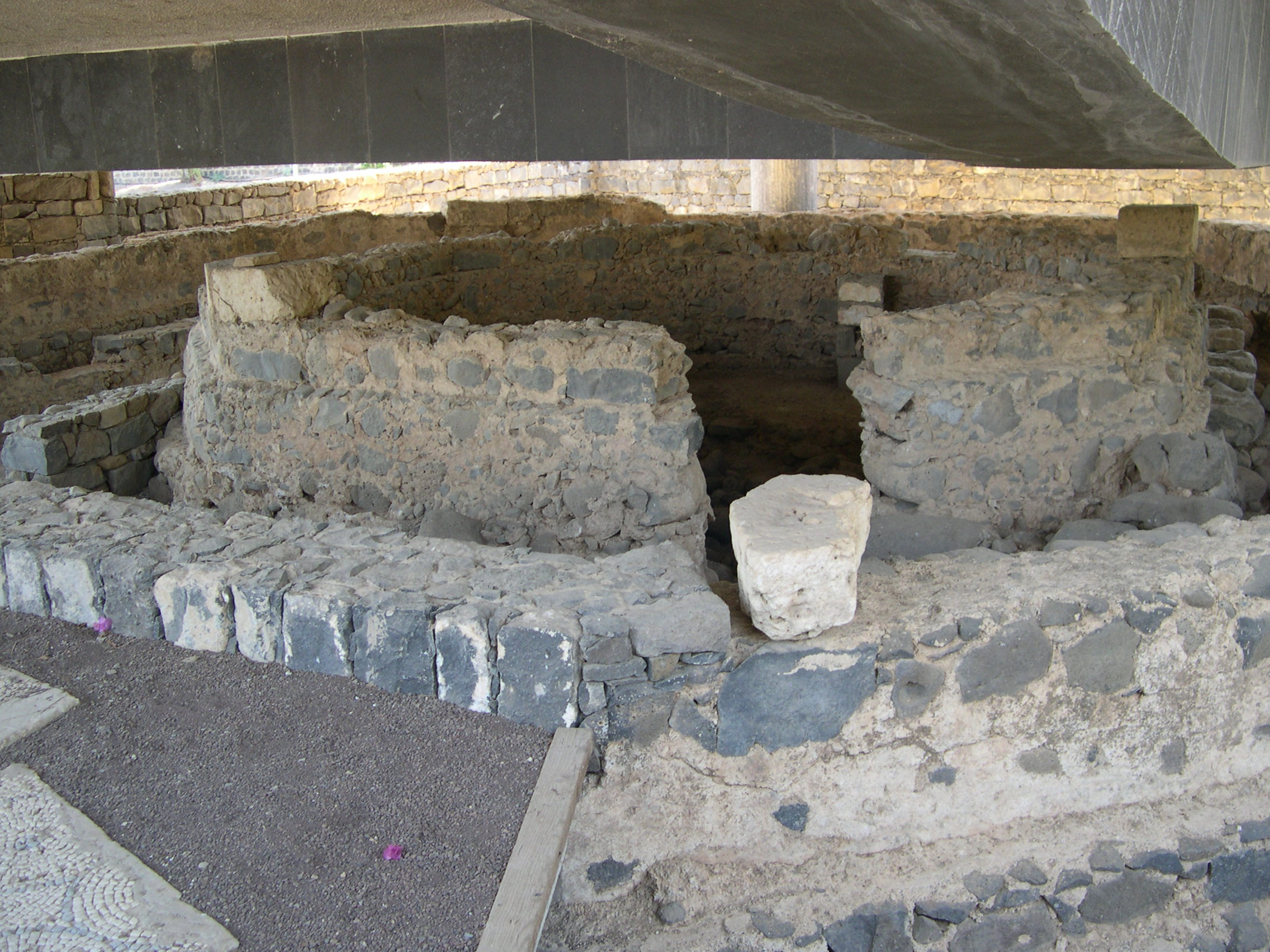 Развалины восьмиугольной византийской церкви на месте дома апостола Петра В Капернауме, Израиль.